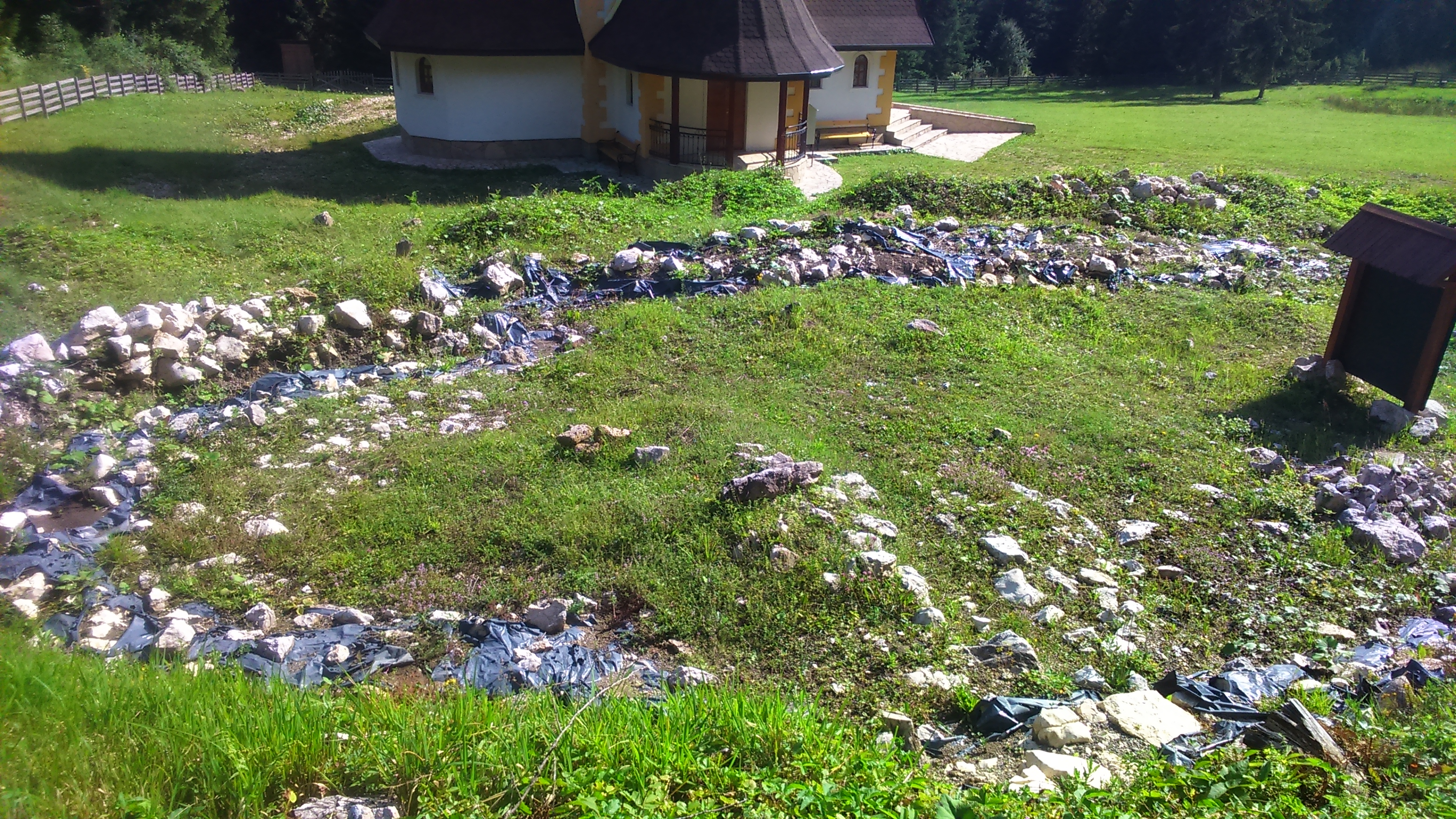 Цркву је саградио краљ Стефан Драгутин као поклон бану Стефану I Котроманићу за кога је била удата Јелисавета Немањић, ћерка краља Драгутина. У љетопису рогатичке цркве постоји податак да је краљ Драгутин у оквиру манастирског конака имао и свој љетњиковац, у којем је повремено обављао државничке послове и сусретао се са баном Босне Стефаном I Котроманићем.